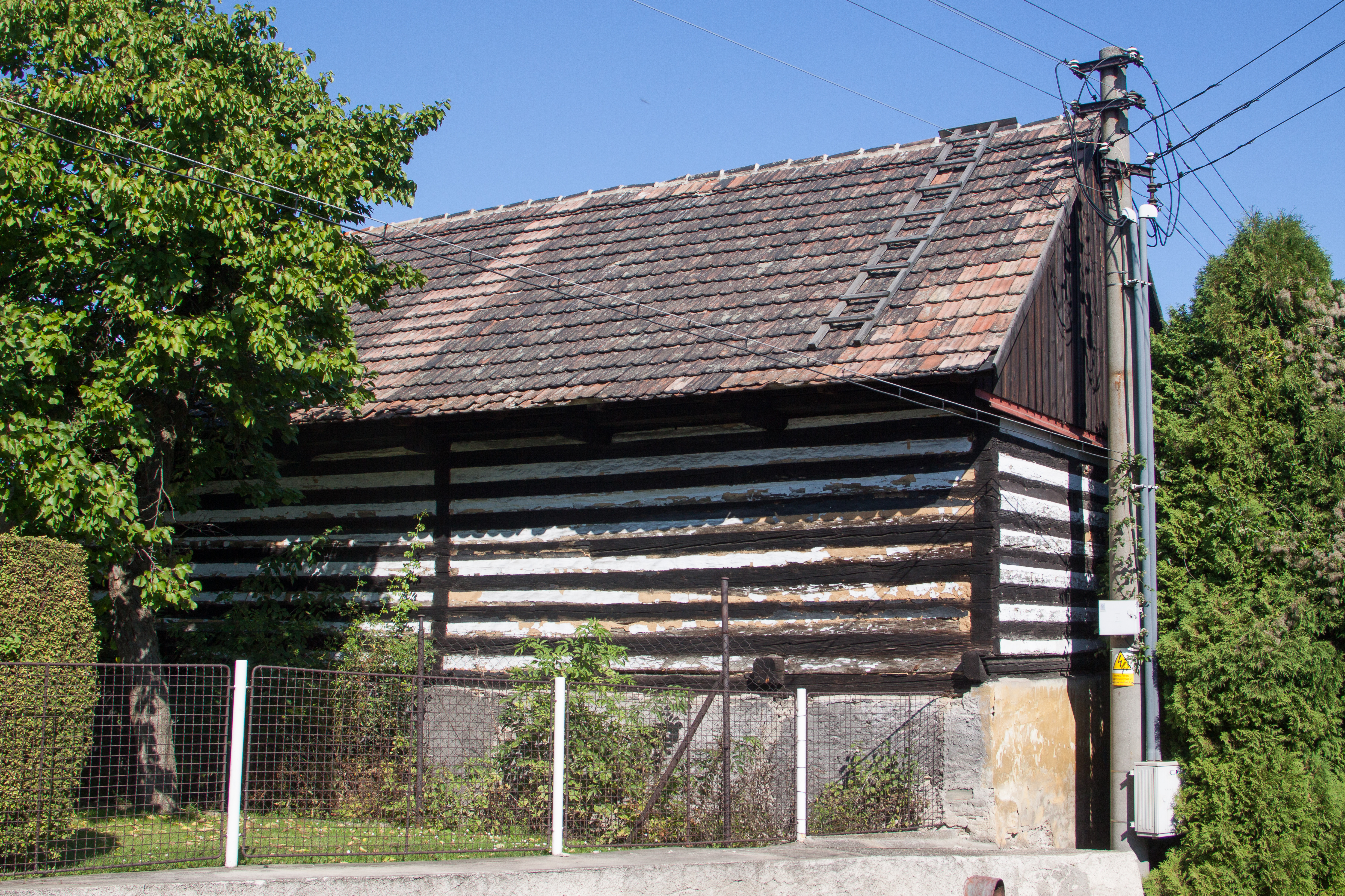 Sýpka, u čp. 51, Hostín